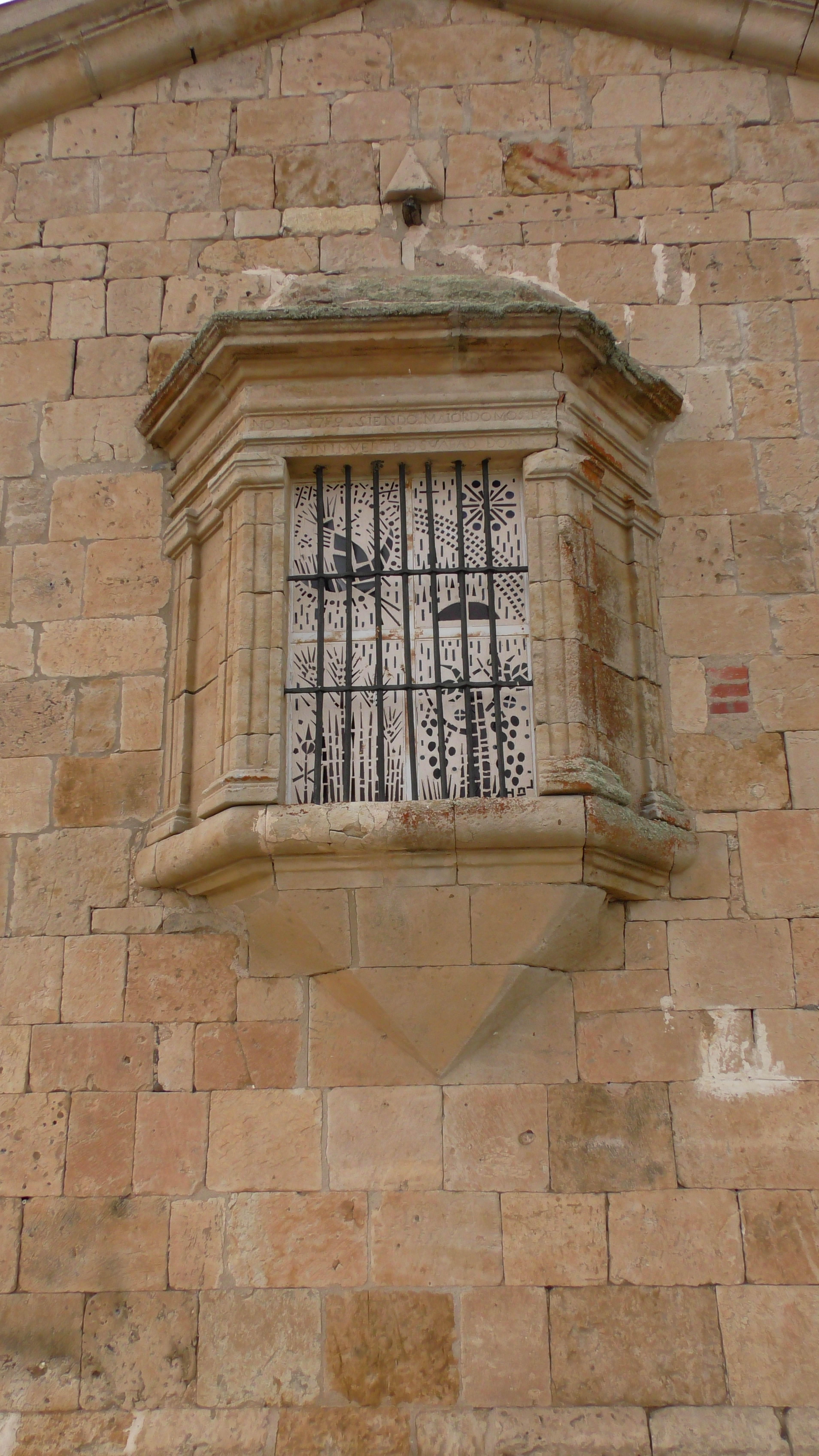 Peleas de Arriba. Iglesia. Detalle de la cabecera.